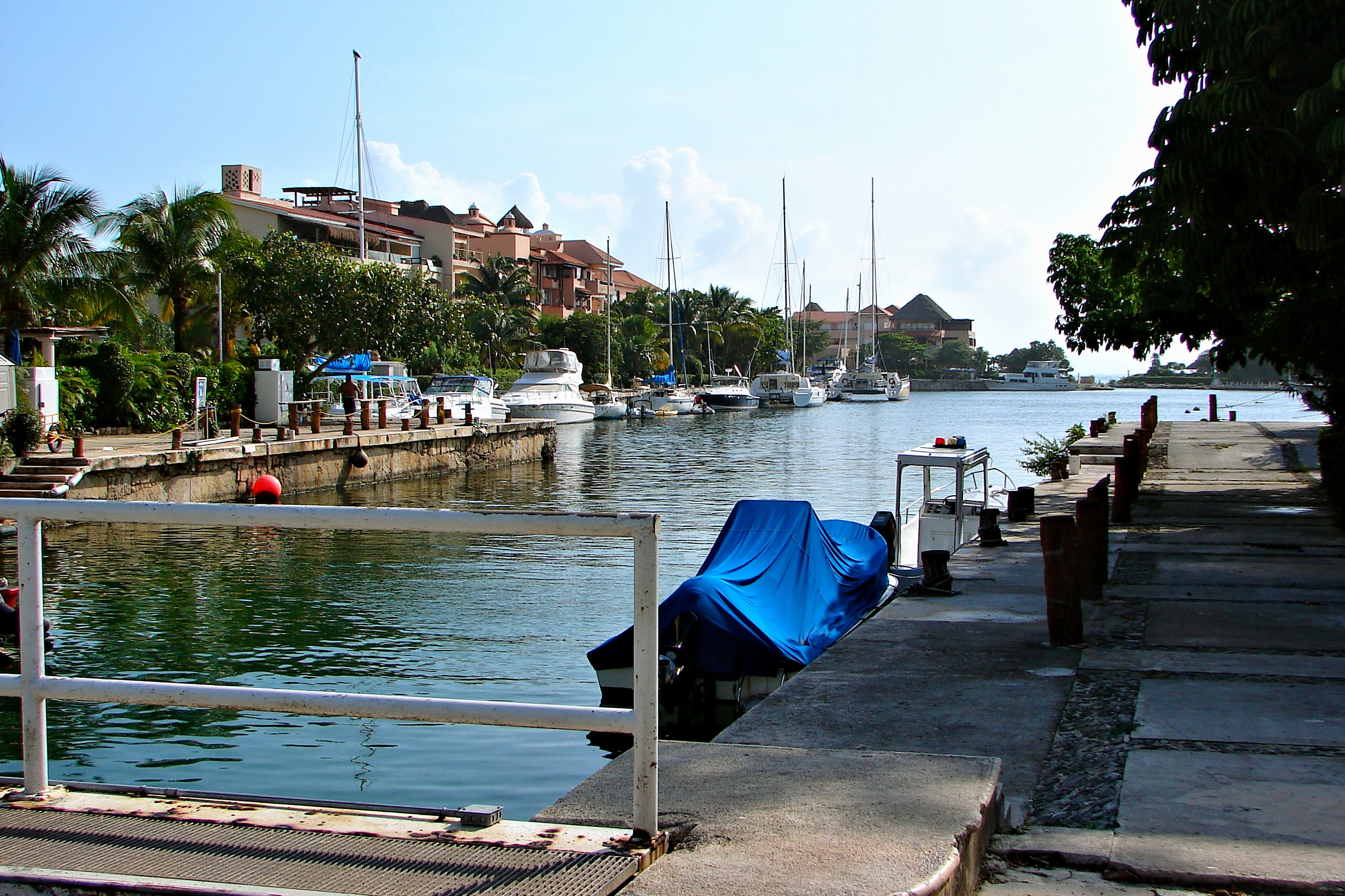 Puerto Aventuras (coastal tourist village), Quintana Roo, Mexico